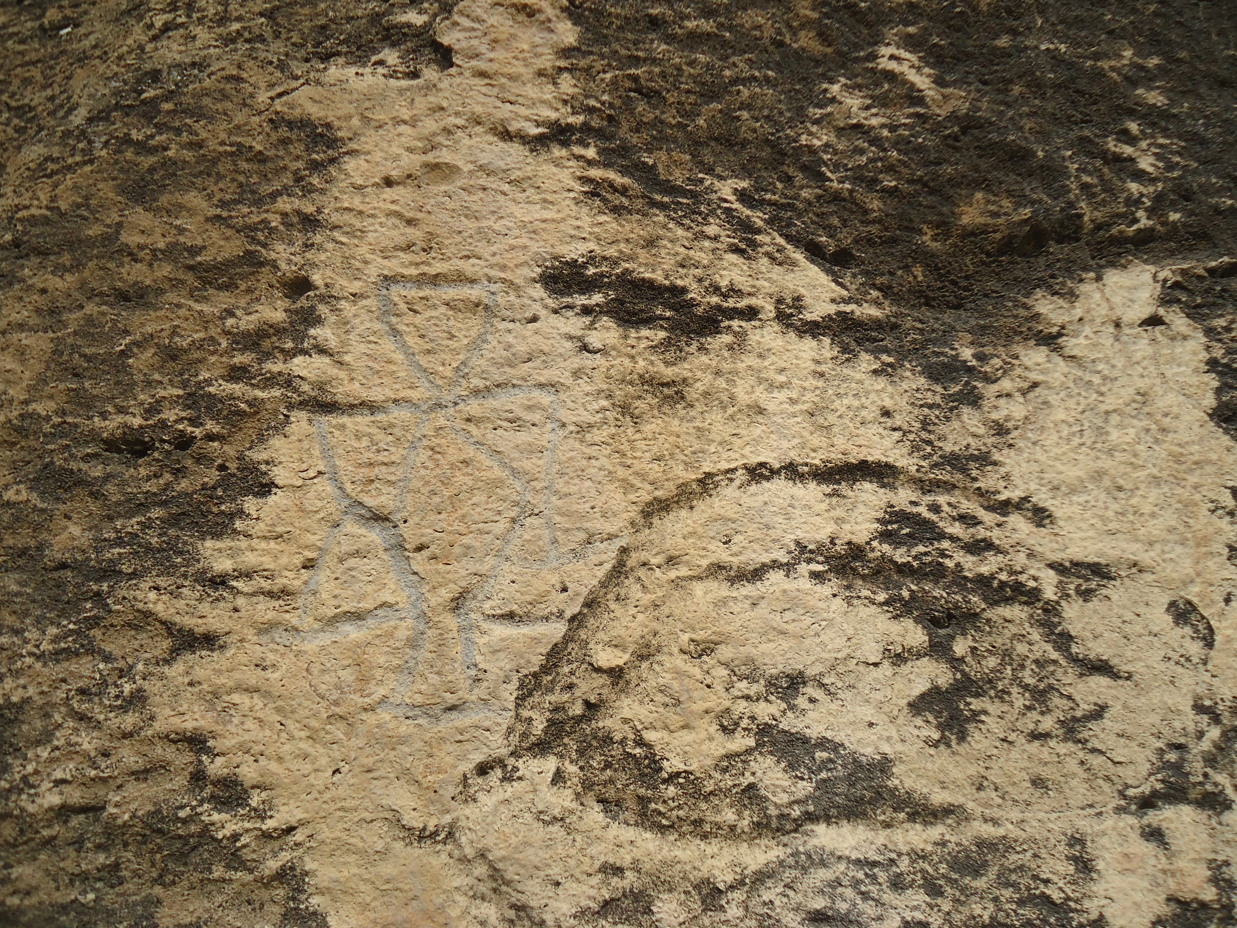 Yazılıtəpədə daş üzərində işarə